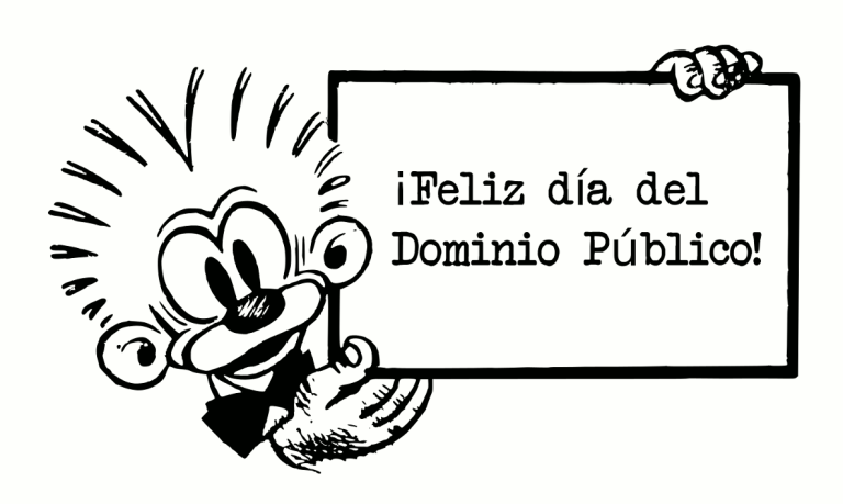 Póster del Día del Dominio Público 2016 publicado en el sitio web de Creative Commons Uruguay, reutilizando la imagen del personaje de historietas Peloduro.